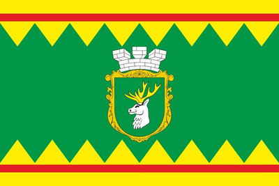 прапор Рахова